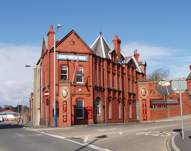 Железнодорожная станция в Дугласе, остров Мэн